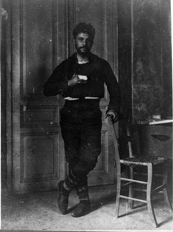 Телос Агапинос ранен.